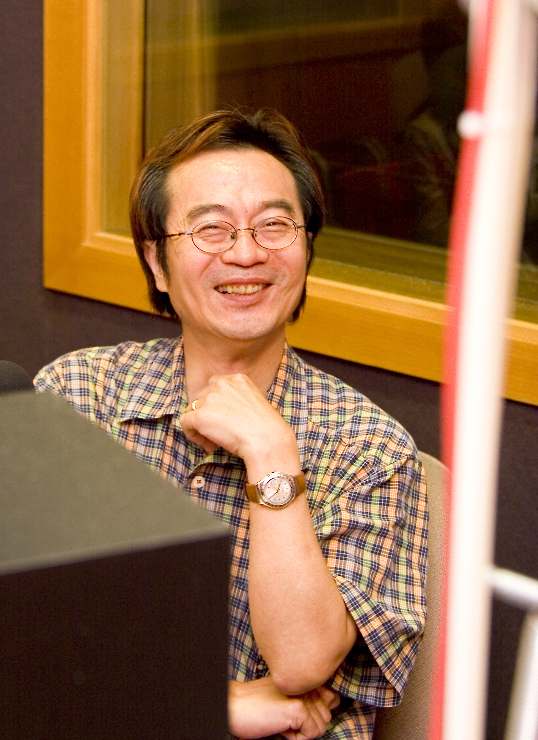 屏風表演班創辦人李國修接受楊玉欣主持的中廣流行網節目《角落欣世界》訪問。